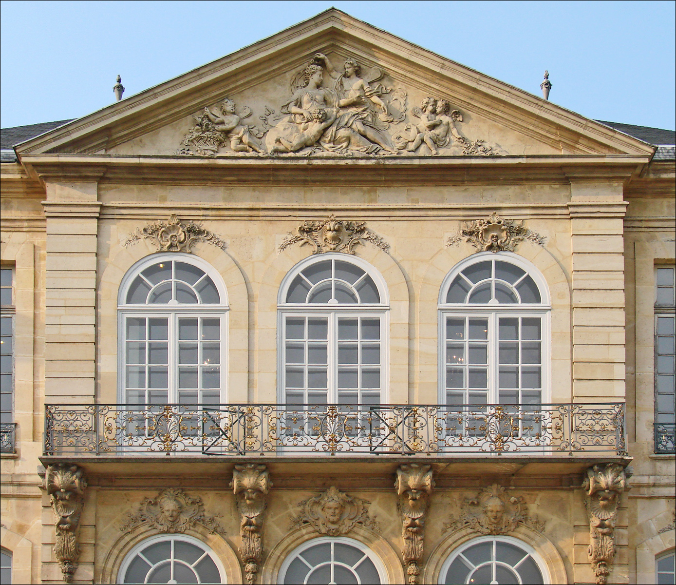 Au 77, de la rue de Varenne, au pied du dôme des Invalides, se dresse l'hôtel Biron, non pas compris entre cour et jardin comme il l'est de tradition pour tous les hôtels du faubourg Saint-Germain, mais isolé, tel un véritable château, au milieu d'un parc de trois hectares. Construit entre 1728 et 1730 par Jean Aubert, le futur architecte des fastueuses écuries du château de Chantilly, l'hôtel fut commandé par Abraham Peyrenc de Moras, perruquier enrichi dans la spéculation sur le papier monnaie. Bien que Peyrenc de Moras fût un véritable "nouveau riche", il fit preuve d'une infaillible sûreté de goût, faisant appel à Aubert qui réalisa là l'un des chefs-d'oeuvre de l'architecture rocaille. Extraits du site du musée Rodin